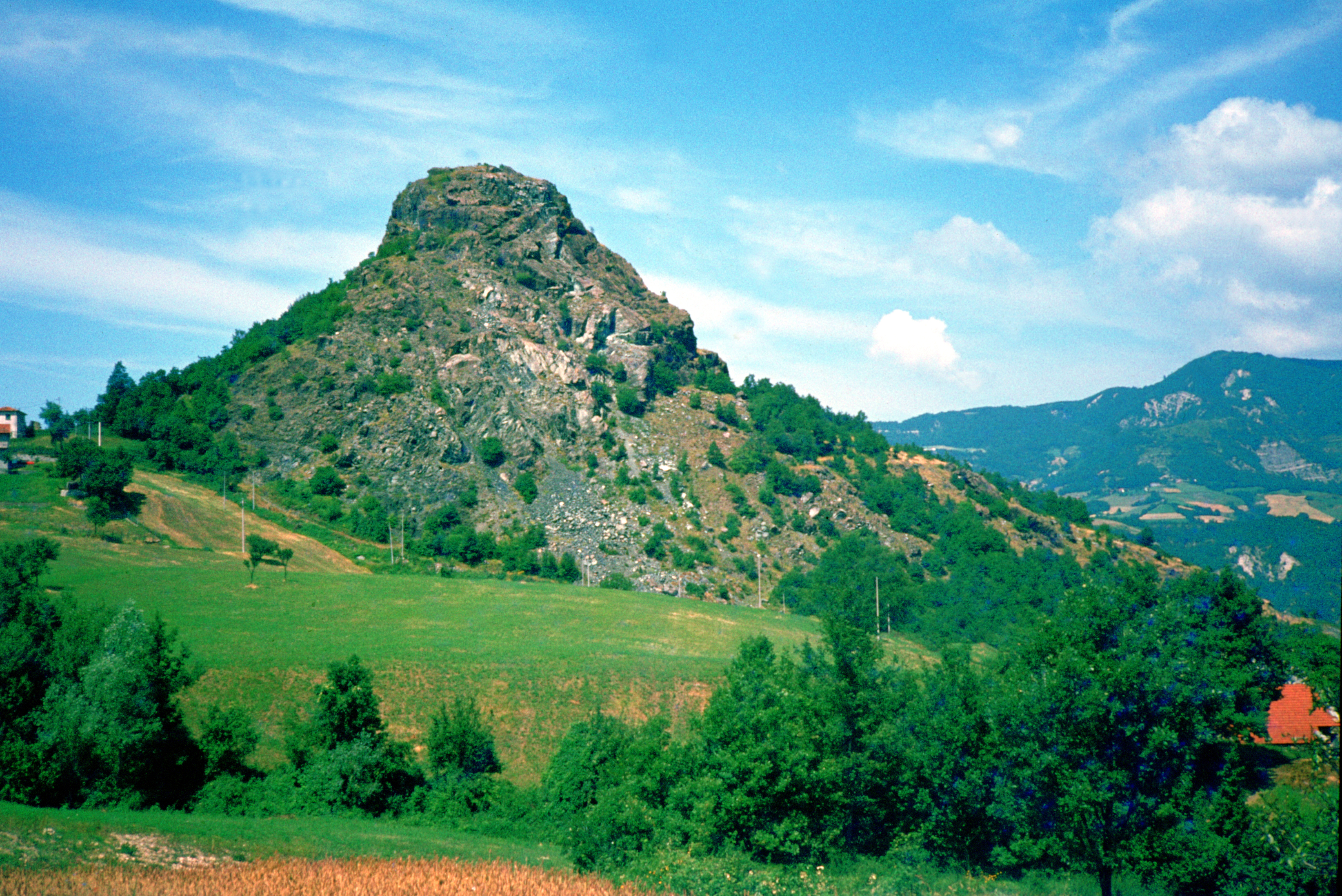 foto del Groppo della Rocca a Varsi (Parma)